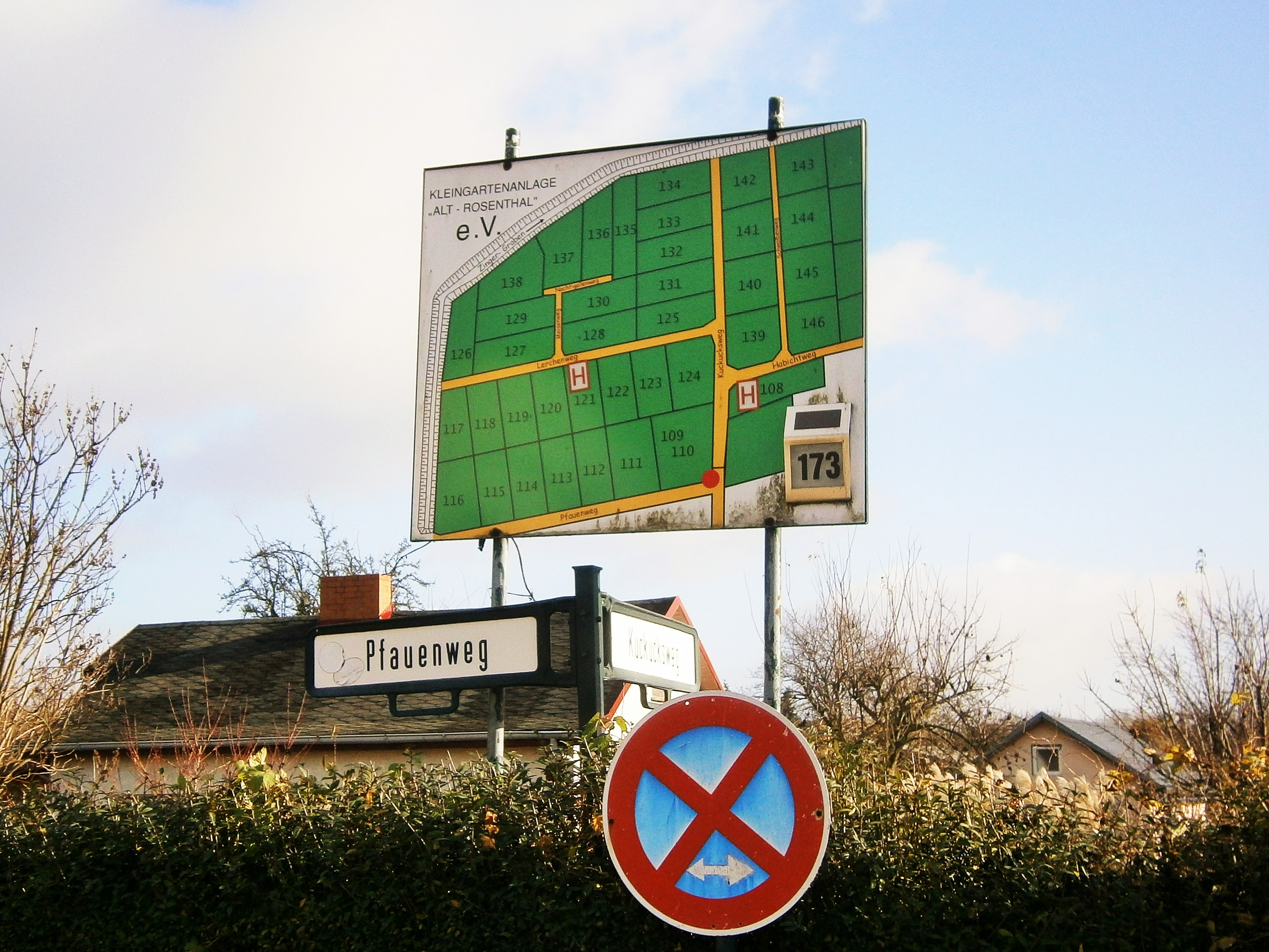 An der Vogelweide ist eine Straße in Berlin-Rosenthal. Das Ostende der Straße an der Kleingartenanalage. Vormals als Hauptstraße weitergeführt.